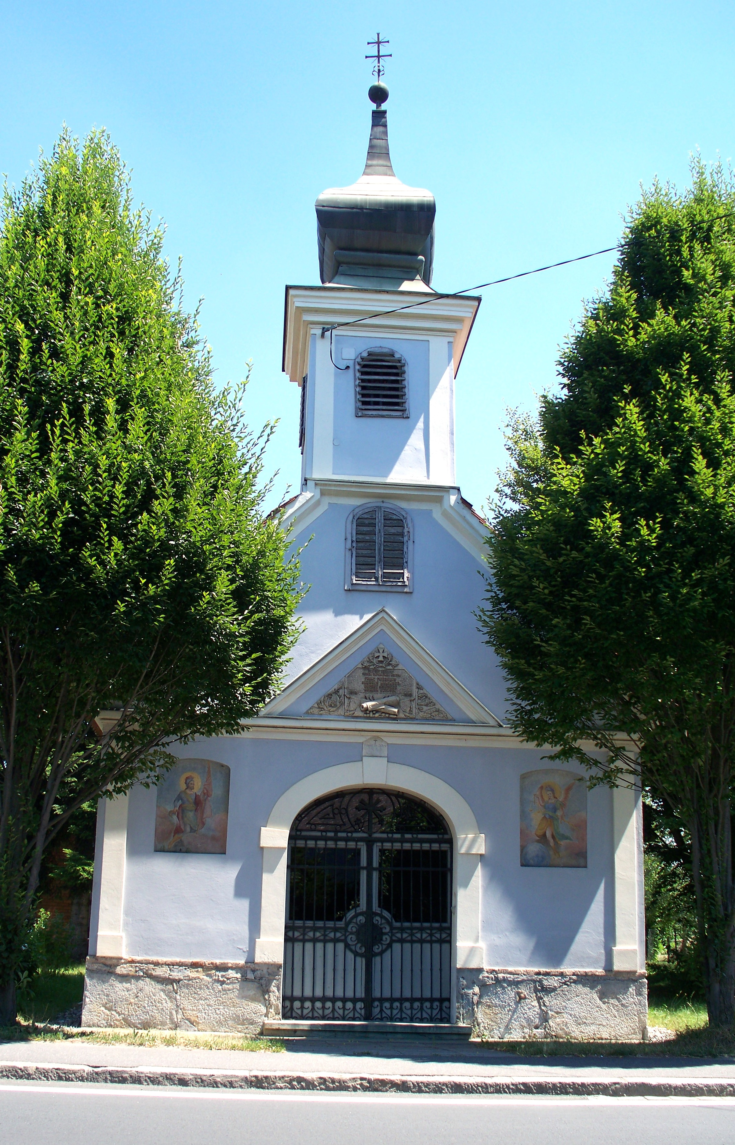 Kapelle in Graz Neudorf neben St.Christoph (2010)